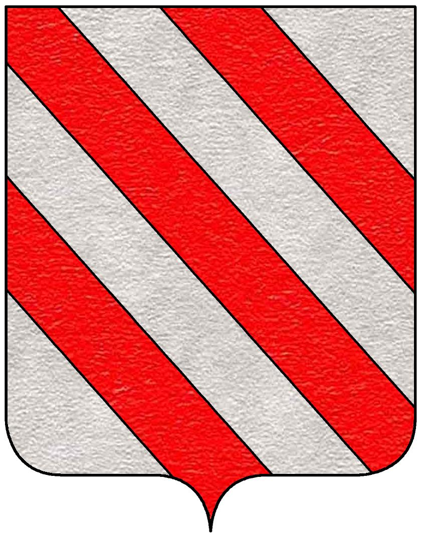 Stemma della famiglia Bandini